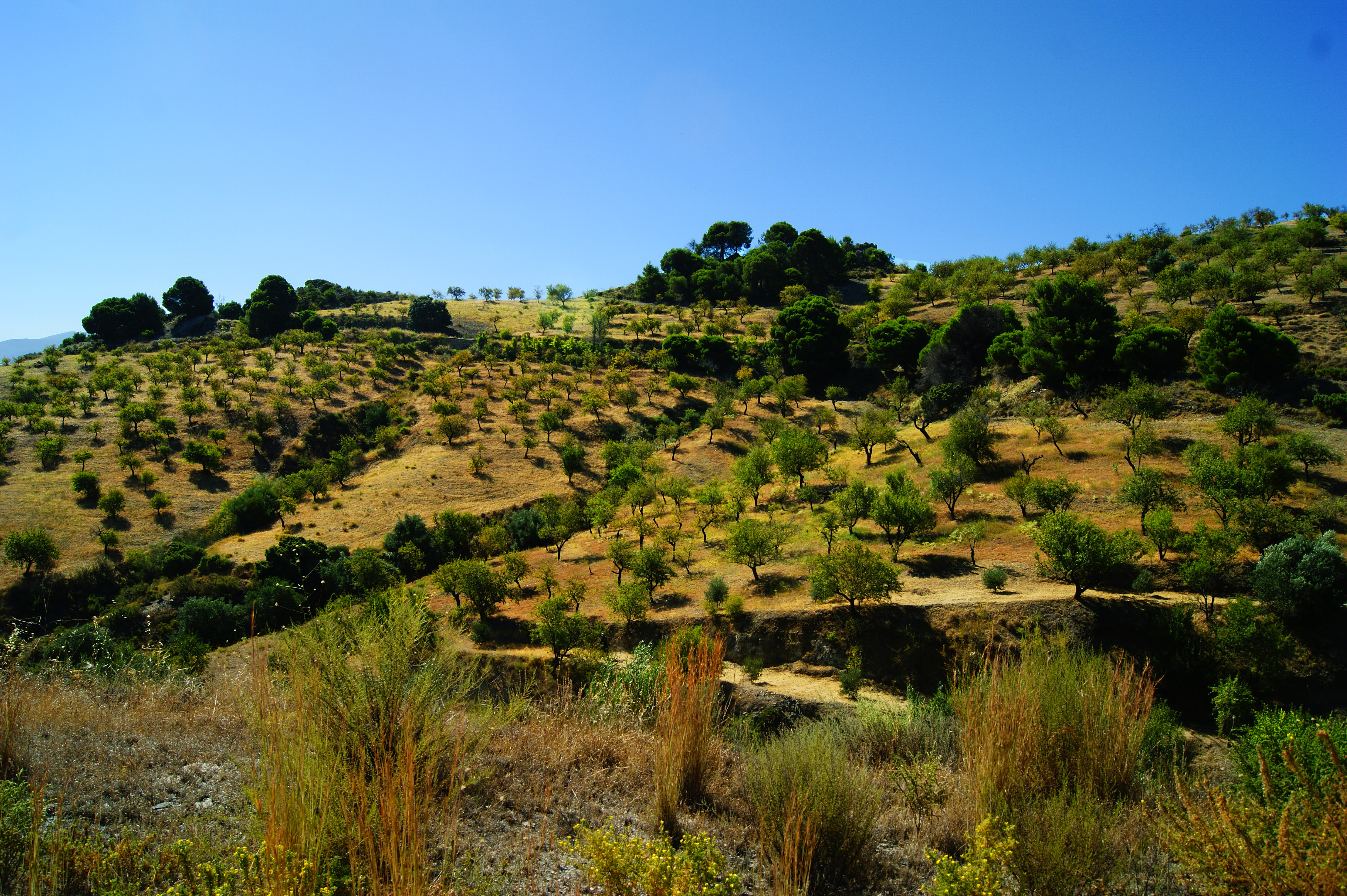 Lecrin